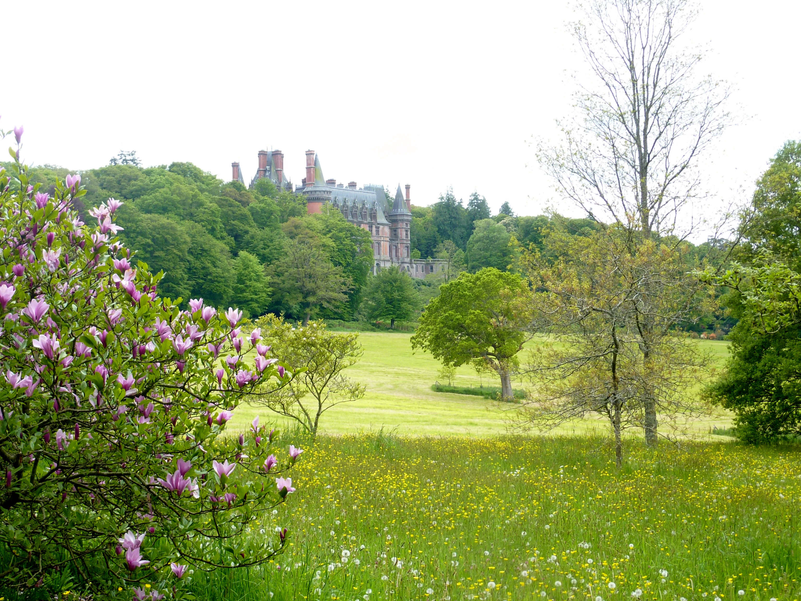 Le château de Trévarez vu du parc et un magnolia en fleurs